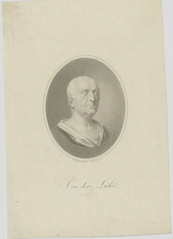 Friedrich Carl Emil von der Lühe postmortem. Entwurf Vincenz Georg Kininger, Zeichner und Friedrich John (ungesichert), Radierer; um 1803 in Punktiermanier (200 x 135 mm (Platte); 224 x 155 mm (Blatt)